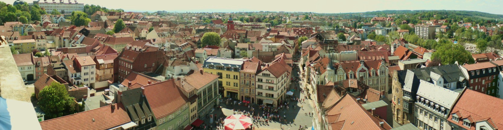 Panorama_Gotha_02